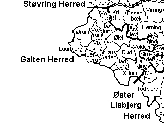 Kort over Galten Herred, Århus Amt